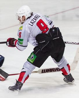 Нападающий новокузнецкого «Металлурга» Антон Лазарев во время матча 1/4 финала Кубка Надежды против хабаровского «Амура» 27 февраля 2013 года.